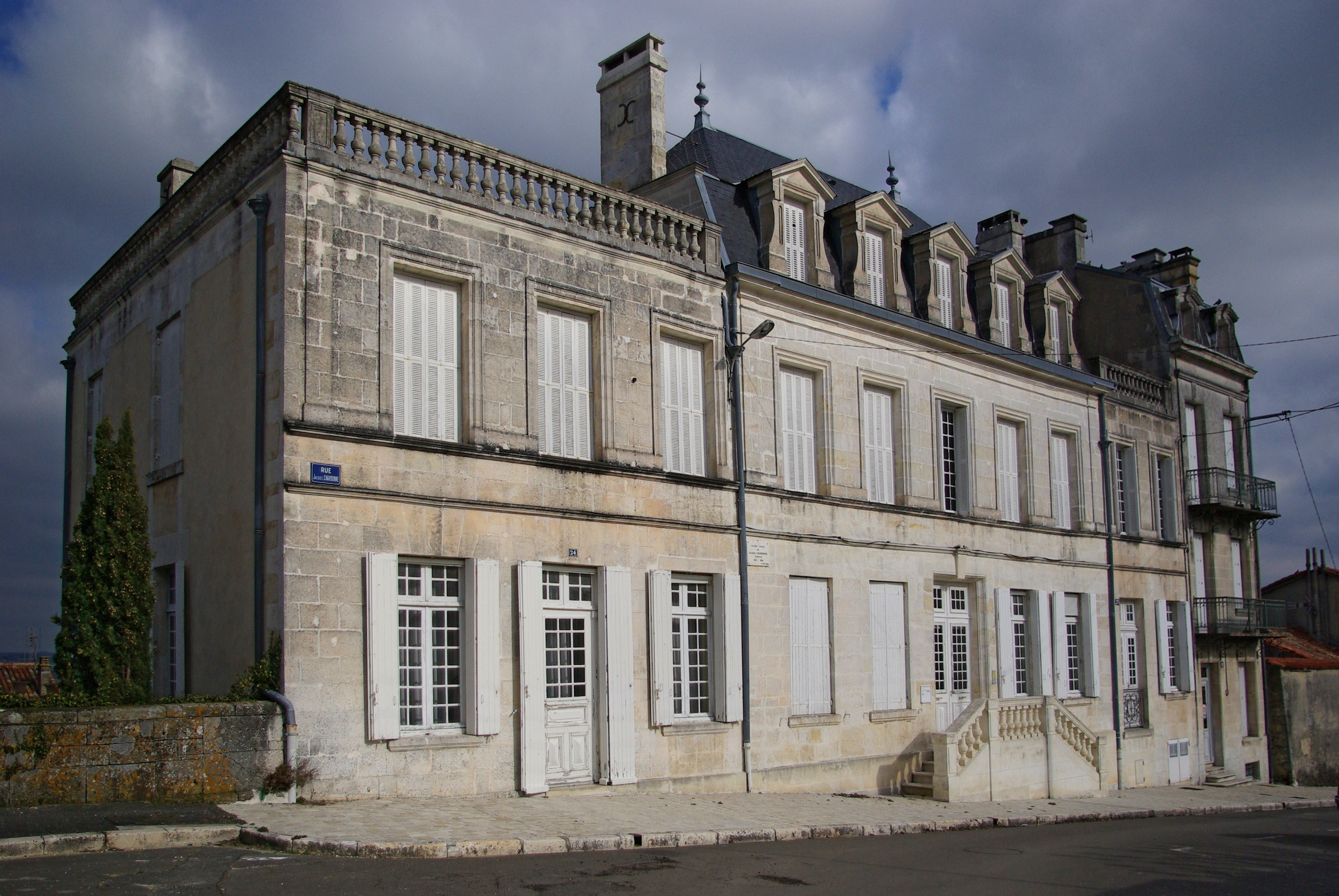 Maison natale de Jacques Chardonne Barbezieux-Saint-Hilaire, Charente, France.